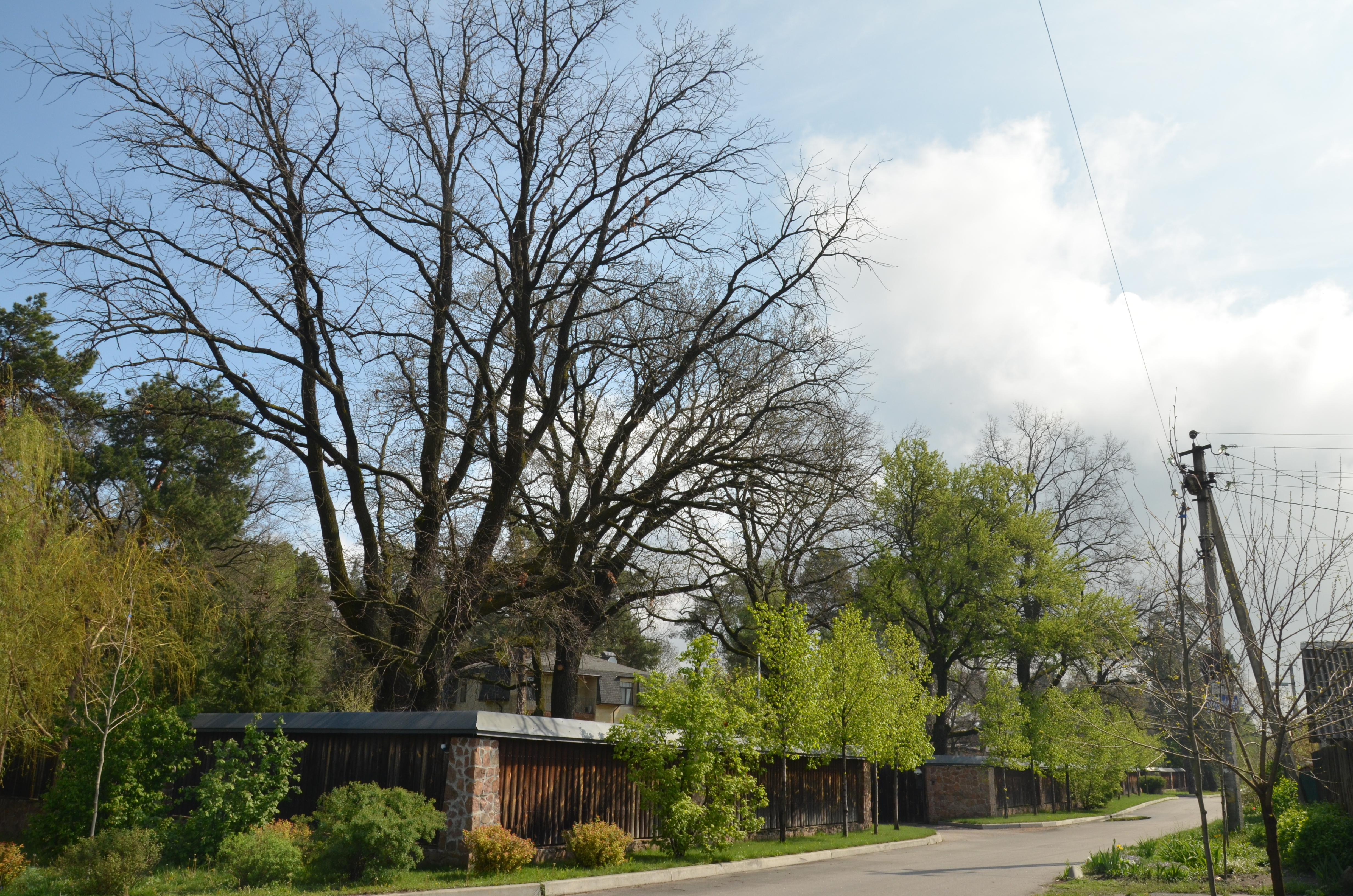 Таценківські дуби-велетні, Обухівський р-н, м. Обухів